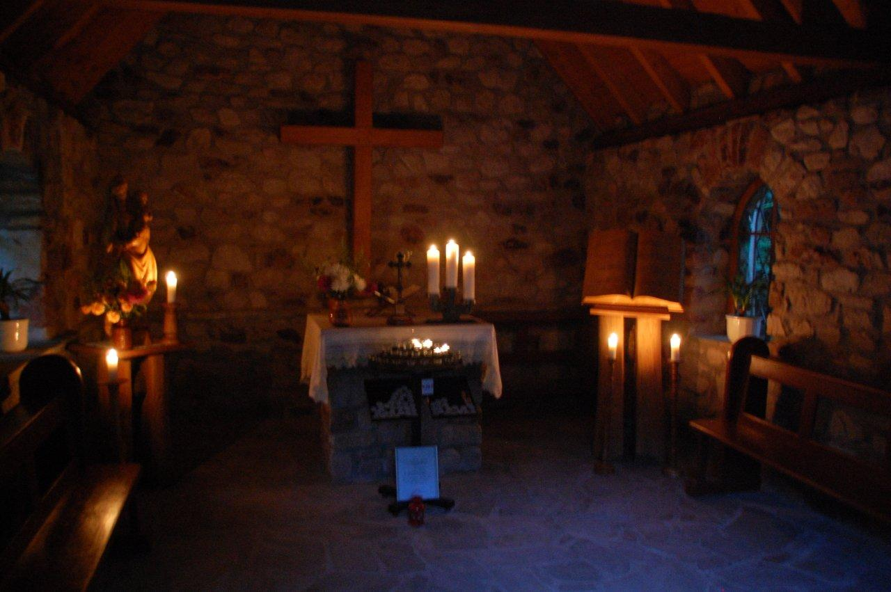 Die wiederaufgebaute Kapelle an der Eremitage Maria Reizenborn von innen. Deutlich zu erkennen ist rechts die handgeschnitzte Bibel und rechts die ebenfalls handgeschnitzte Marienstatue.